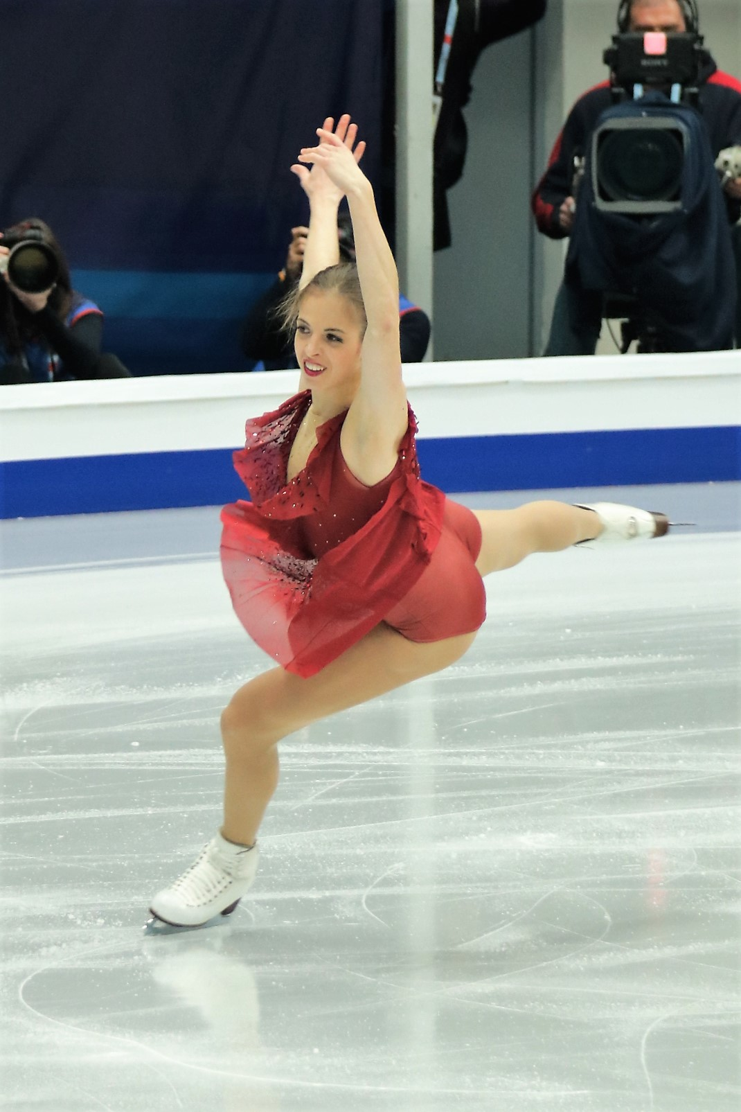 Каролина Костнер (Италия) на Чемпионате Европы по фигурному катанию 2018.